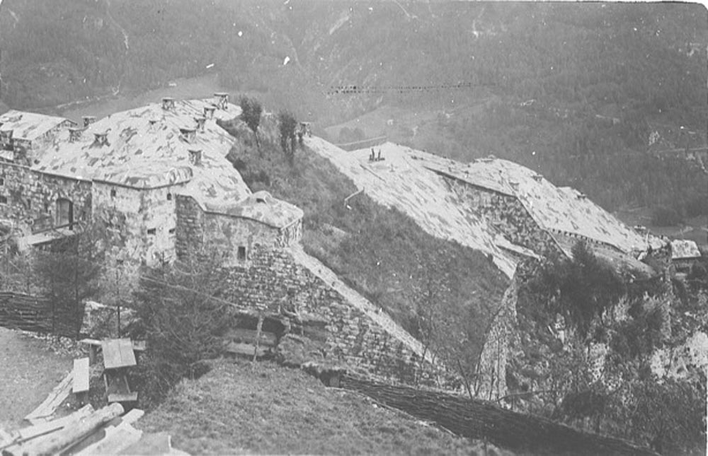 Werk Corno vor Kriegsbeginn 1914/15